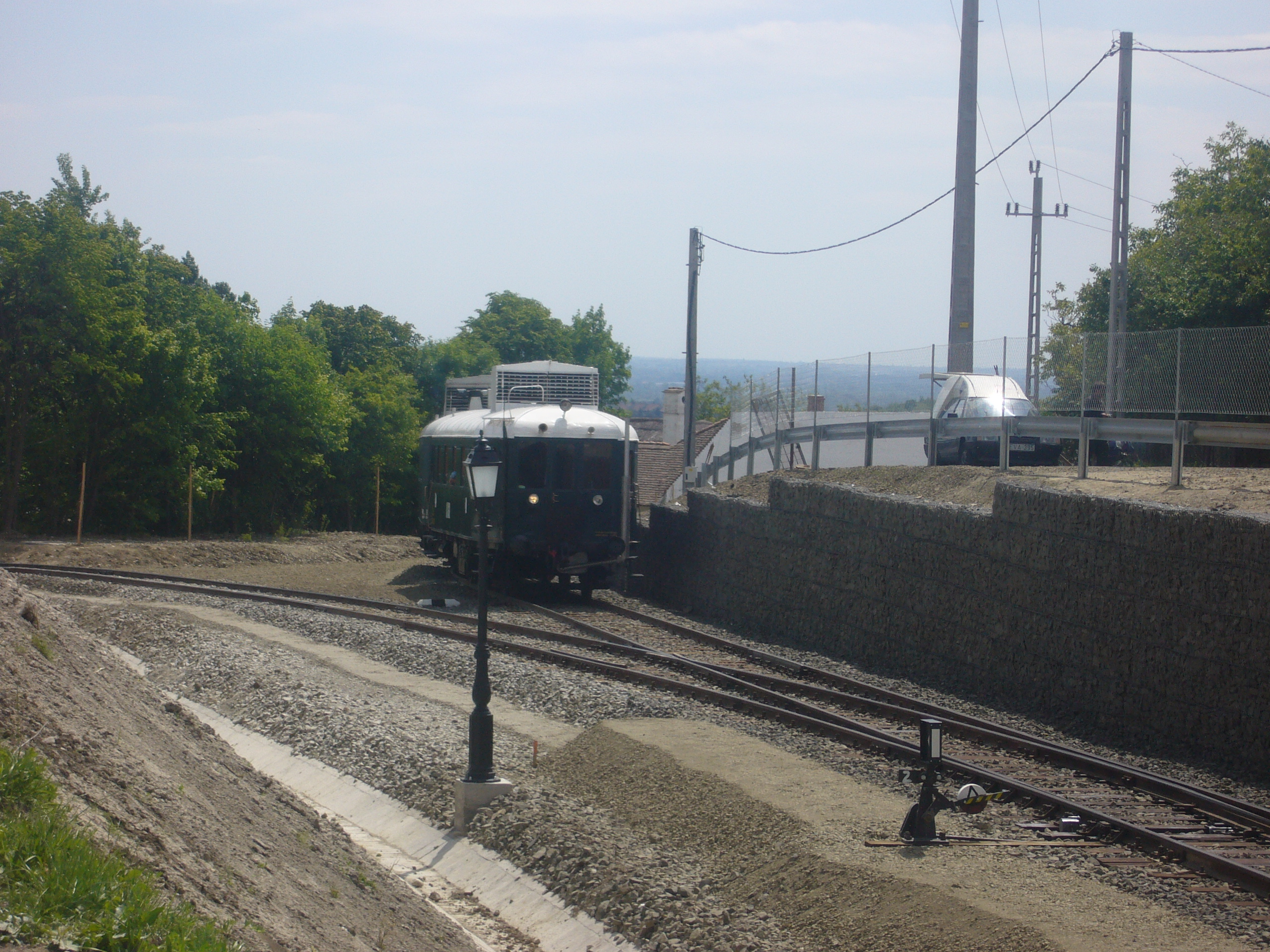 BCmot motorkocsi a kitérőben (szentendrei skanzenvasút)